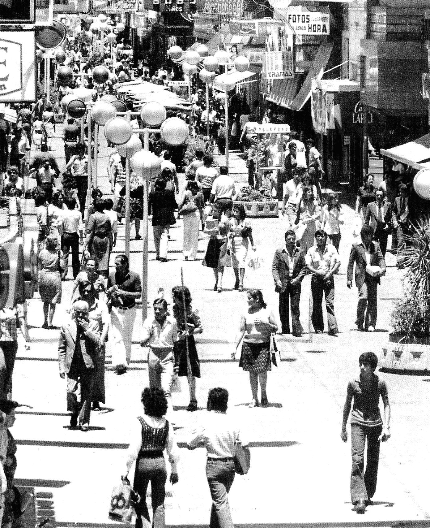 El área peatonal de la ciudad de Córdoba recién inaugurada, 1970. En el dominio público acorde a la ley N° 11.723, artículo 34 (Argentina).